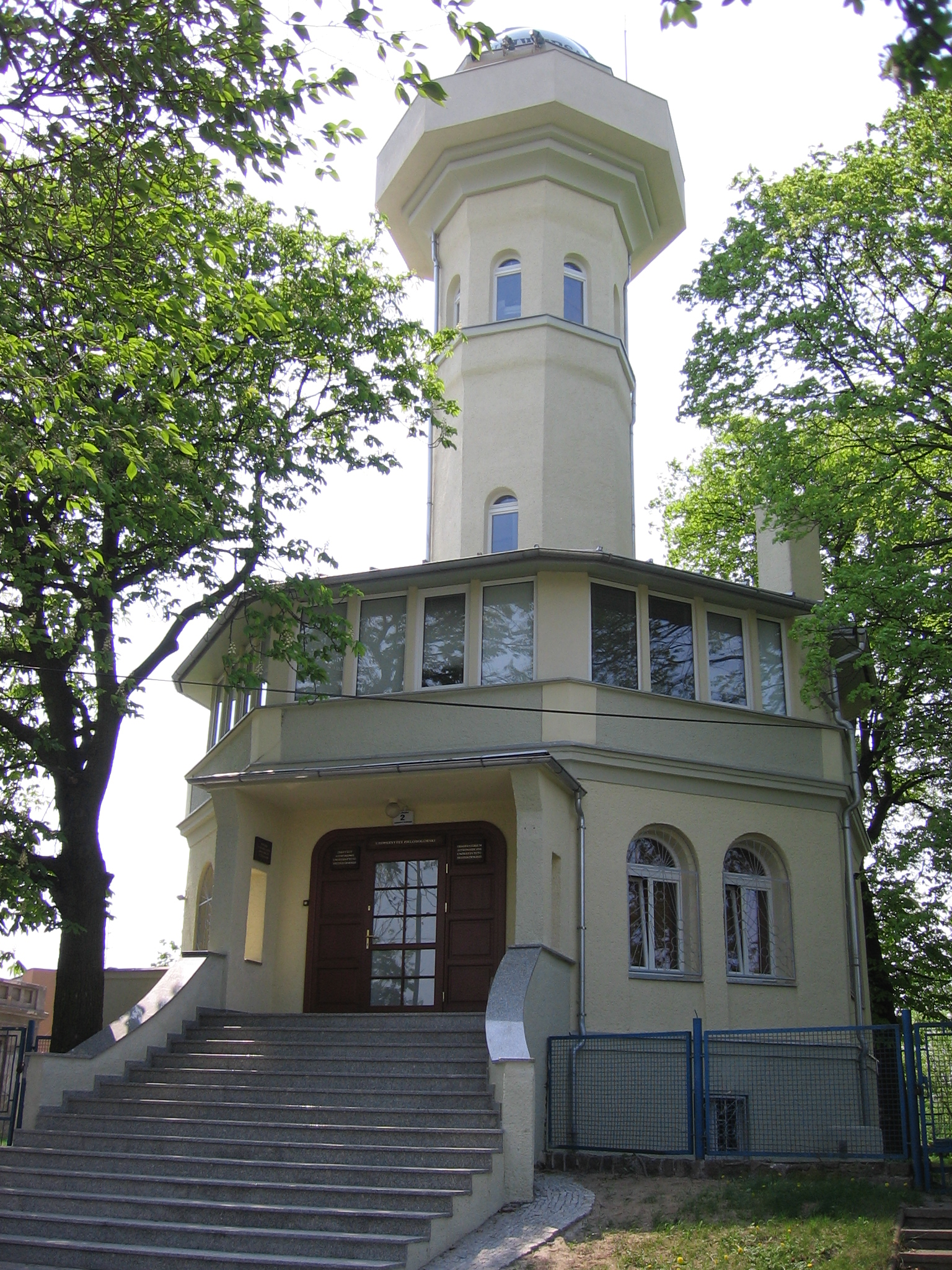 Zielona Góra, Wieża Braniborska w Zielonej Górze przy ul. Lubuskiej 2.